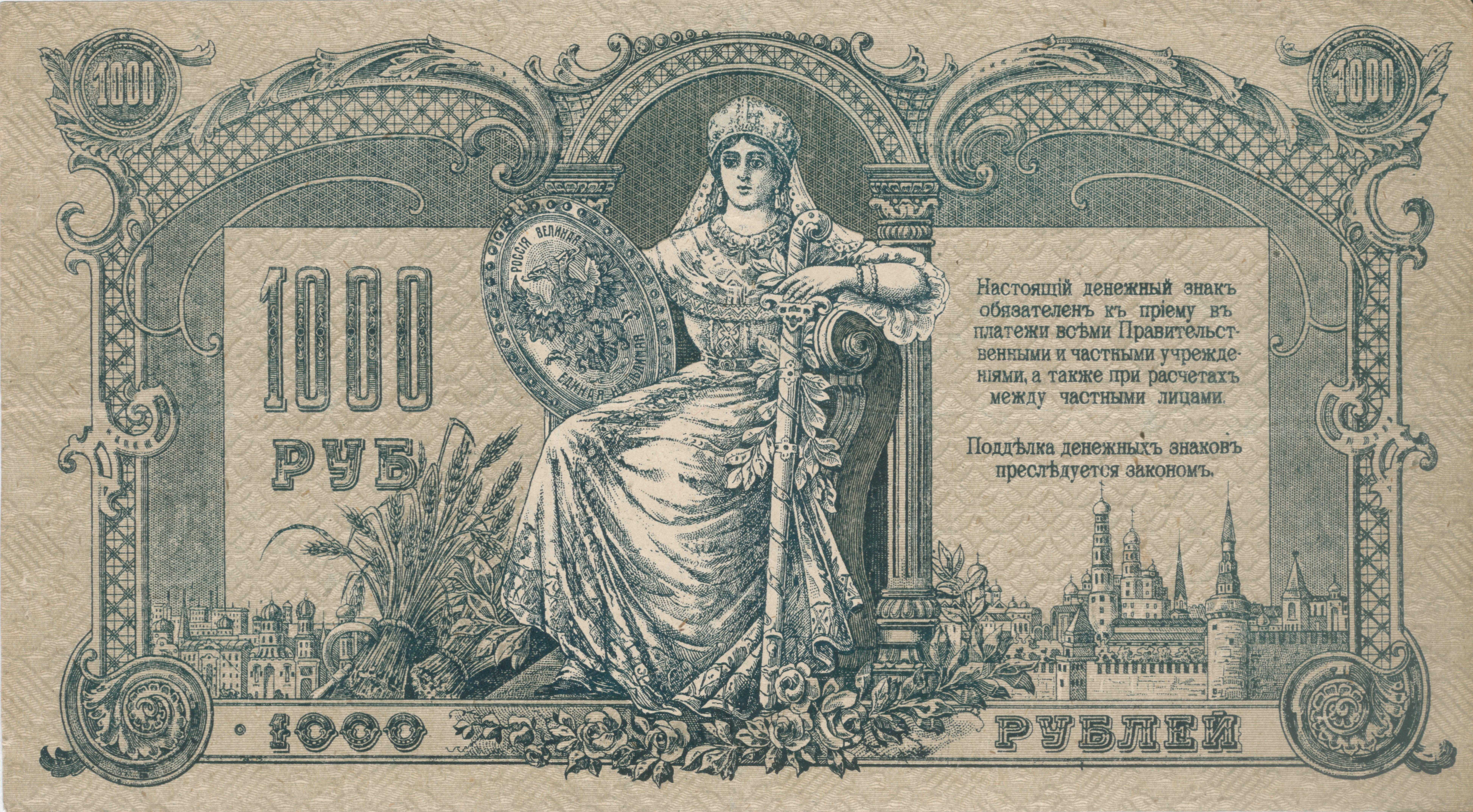 Донские_деньги 1000 рублей. Реверс. 1919. Ростов